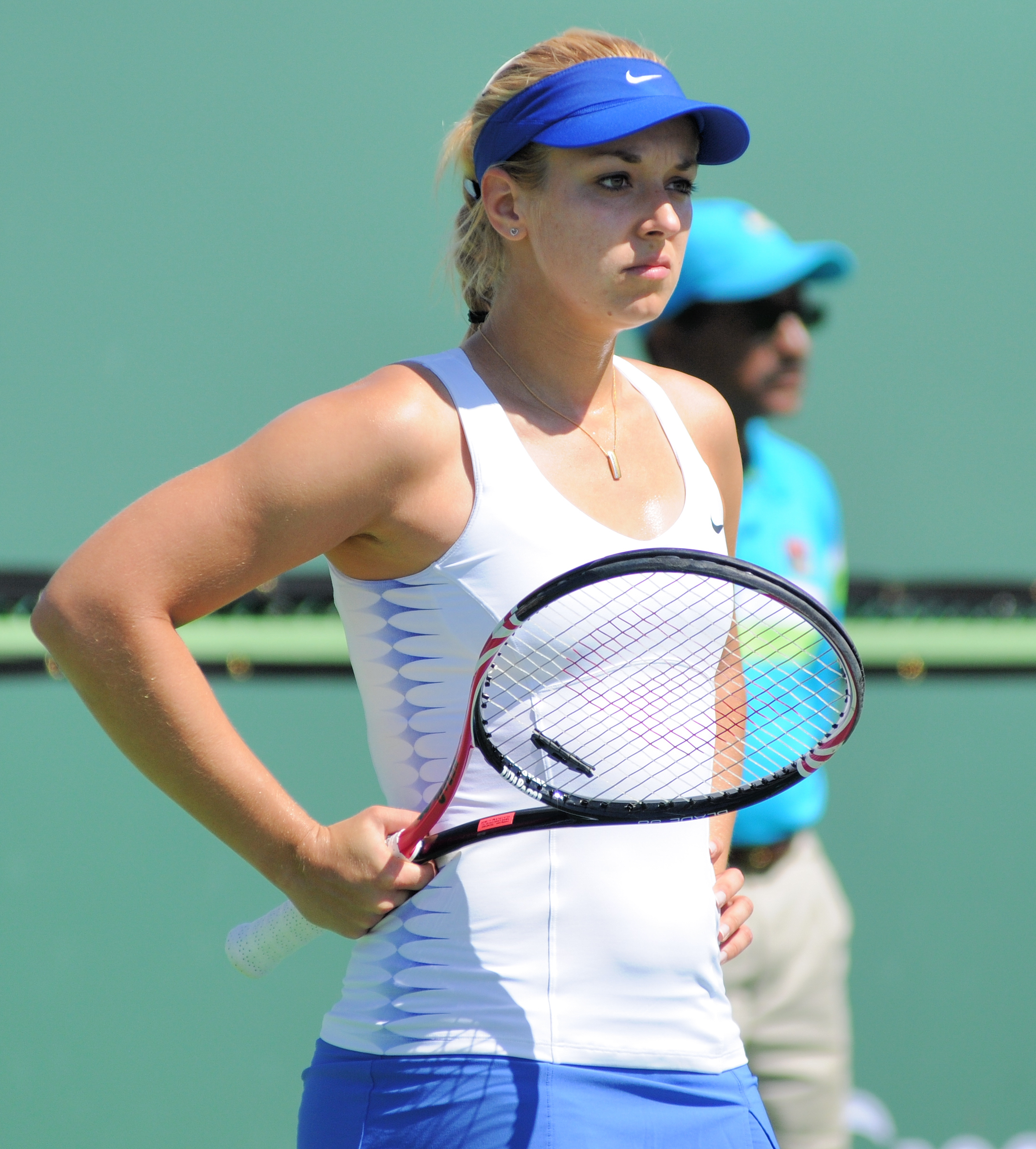 Sabine Lisicki bei den BNP Paribas Open 2012